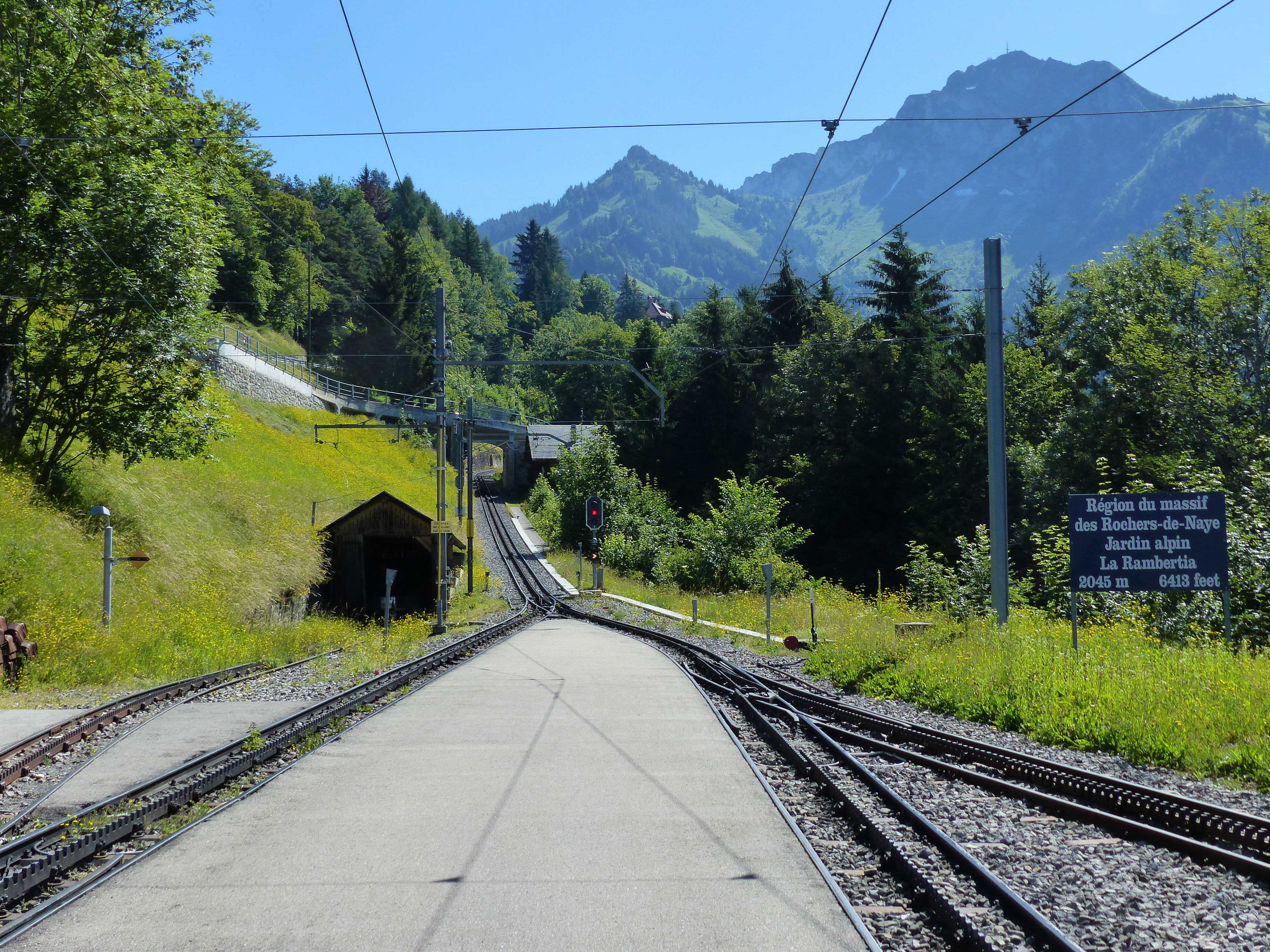 Bahnhof Caux mit Rochers de Naye (rechts)